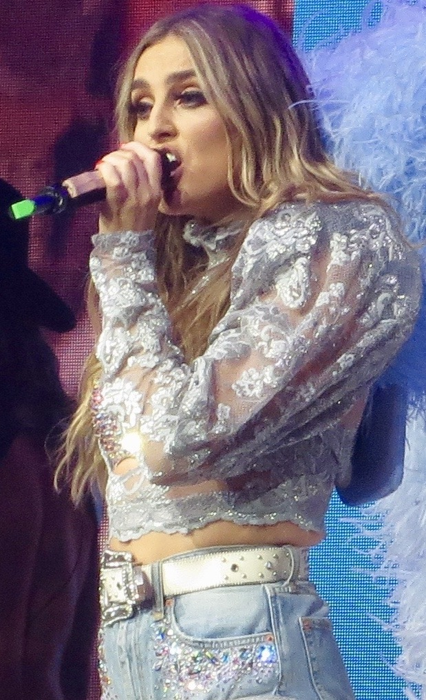 Little Mix 4